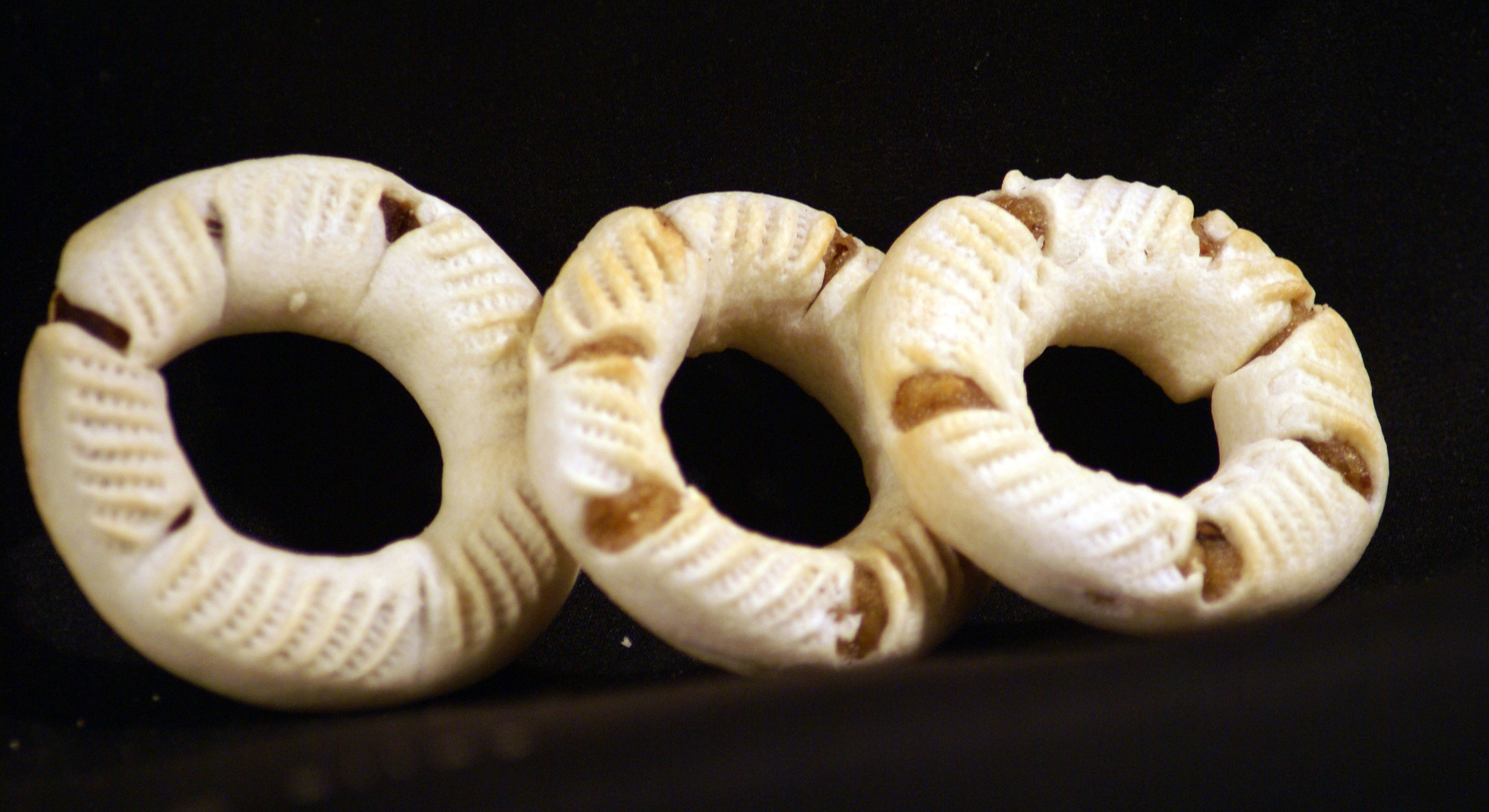 Dolci tipici della tradizione Natalizia a Caltagirone (se ne trovano varianti in tutta la Sicilia orientale e anche a Malta)